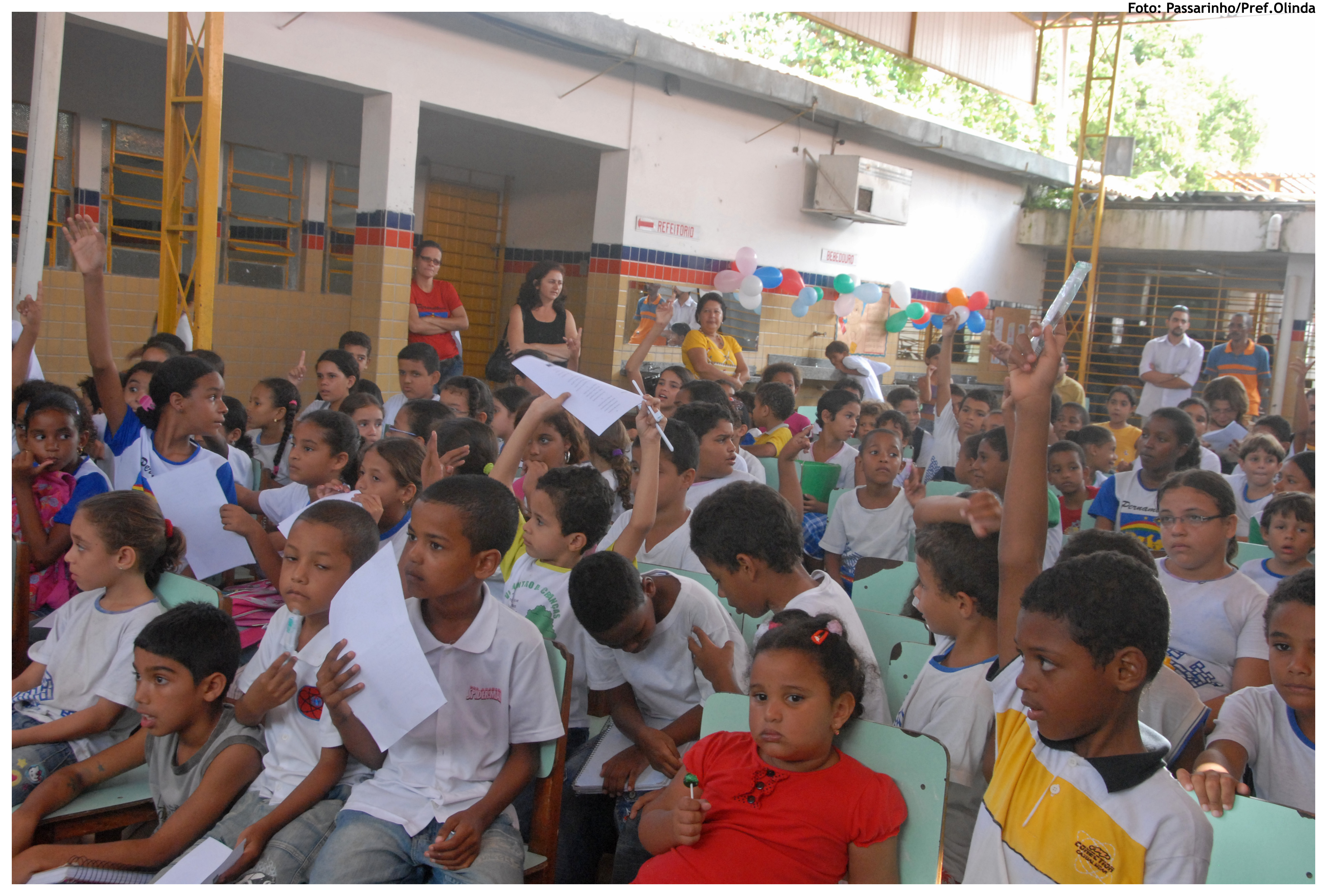 Colonel Joseph Dominic School (Cerca de 300 alunos da Escola Municipal Coronel José Domingos da Silva) Foto: Passarinho/Pref.Olinda